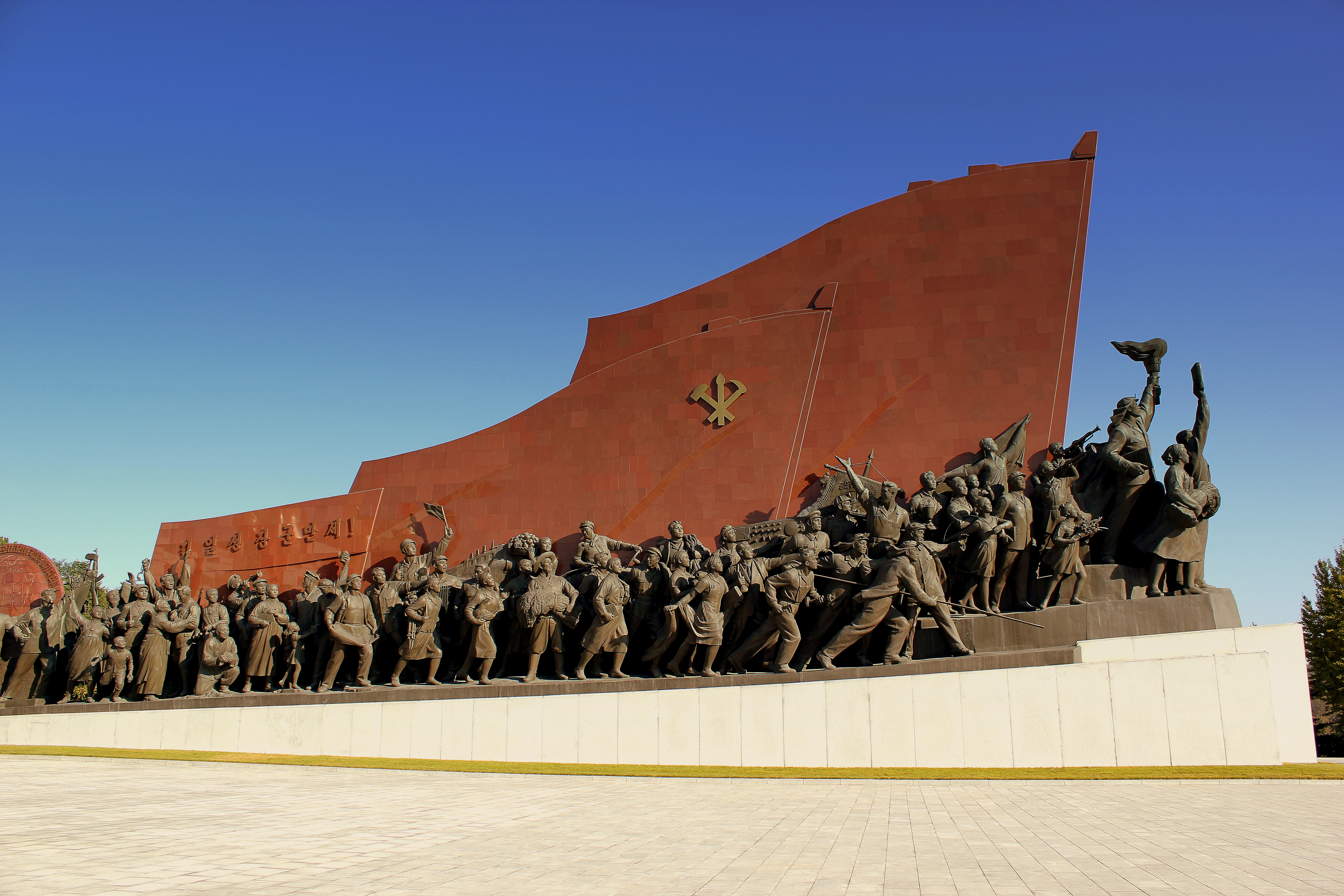 PYONGYANG CITY DPRK NORTH KOREA OCT 2012